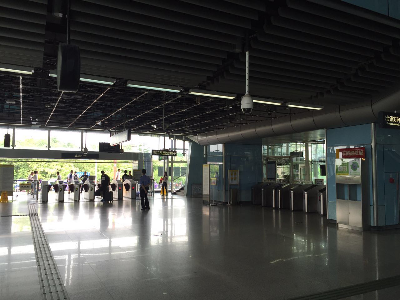 广州地铁东涌站